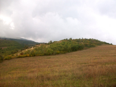 Տեսարան Եղվարդի հելենիստական դամբարանադաշտից